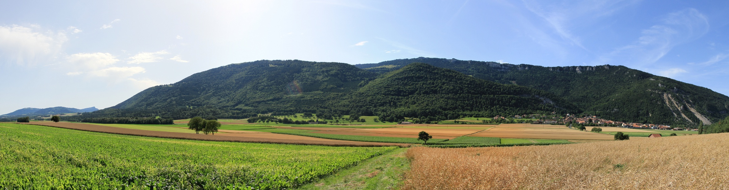 Panorama du Jura depuis le bois de Feurtille avec Baulmes à droite